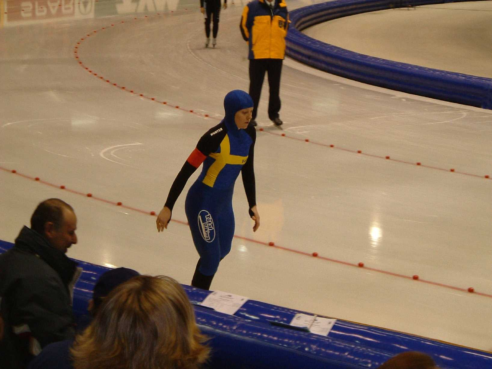 De foto heb ik zelf gemaakt. Dus geen auteursrechten!